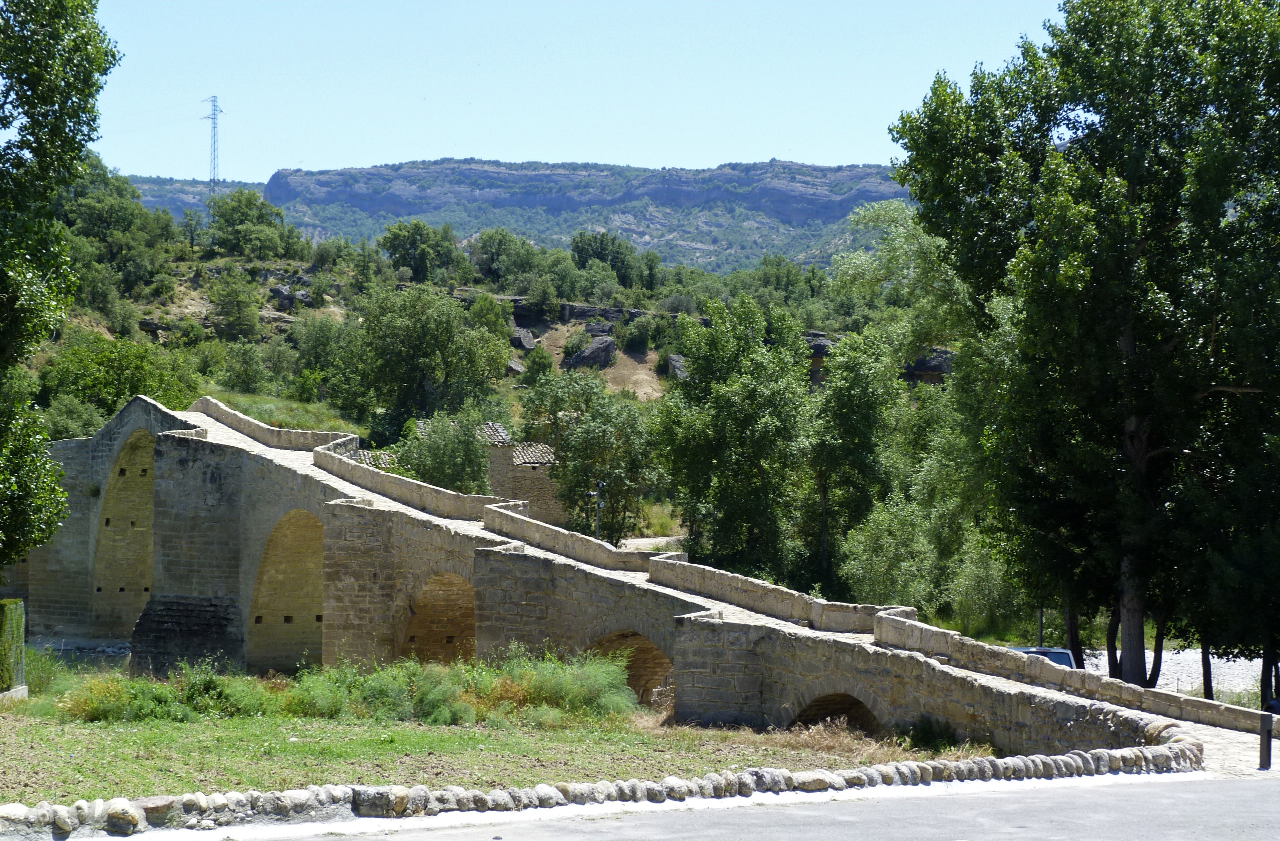 Puente medieval del siglo XIII sobre el río Isábena, en Capella (Huesca, Aragón, España)